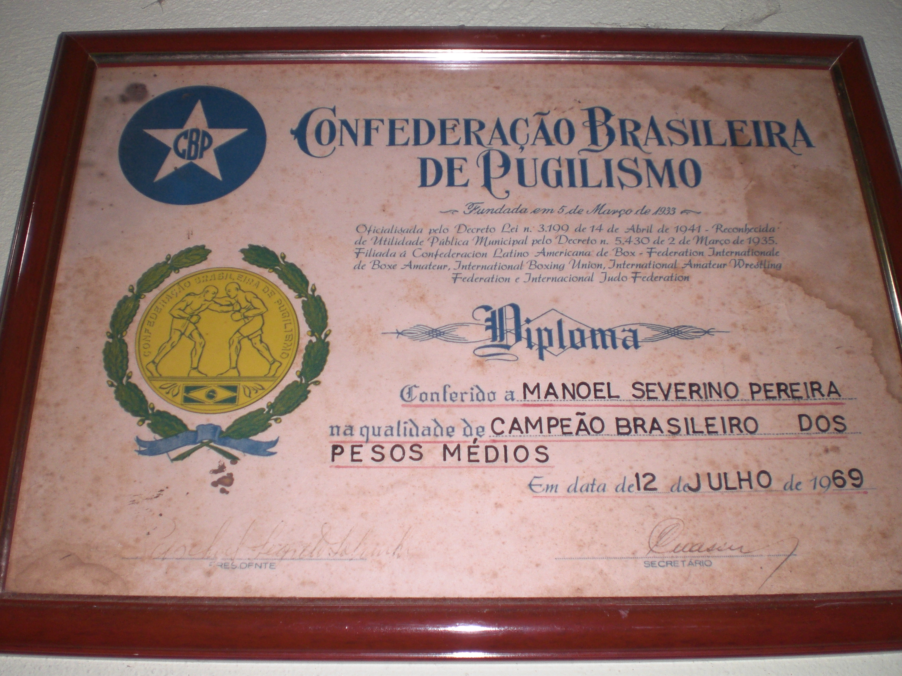 Manoel Severino. Ex lutador de Boxe.